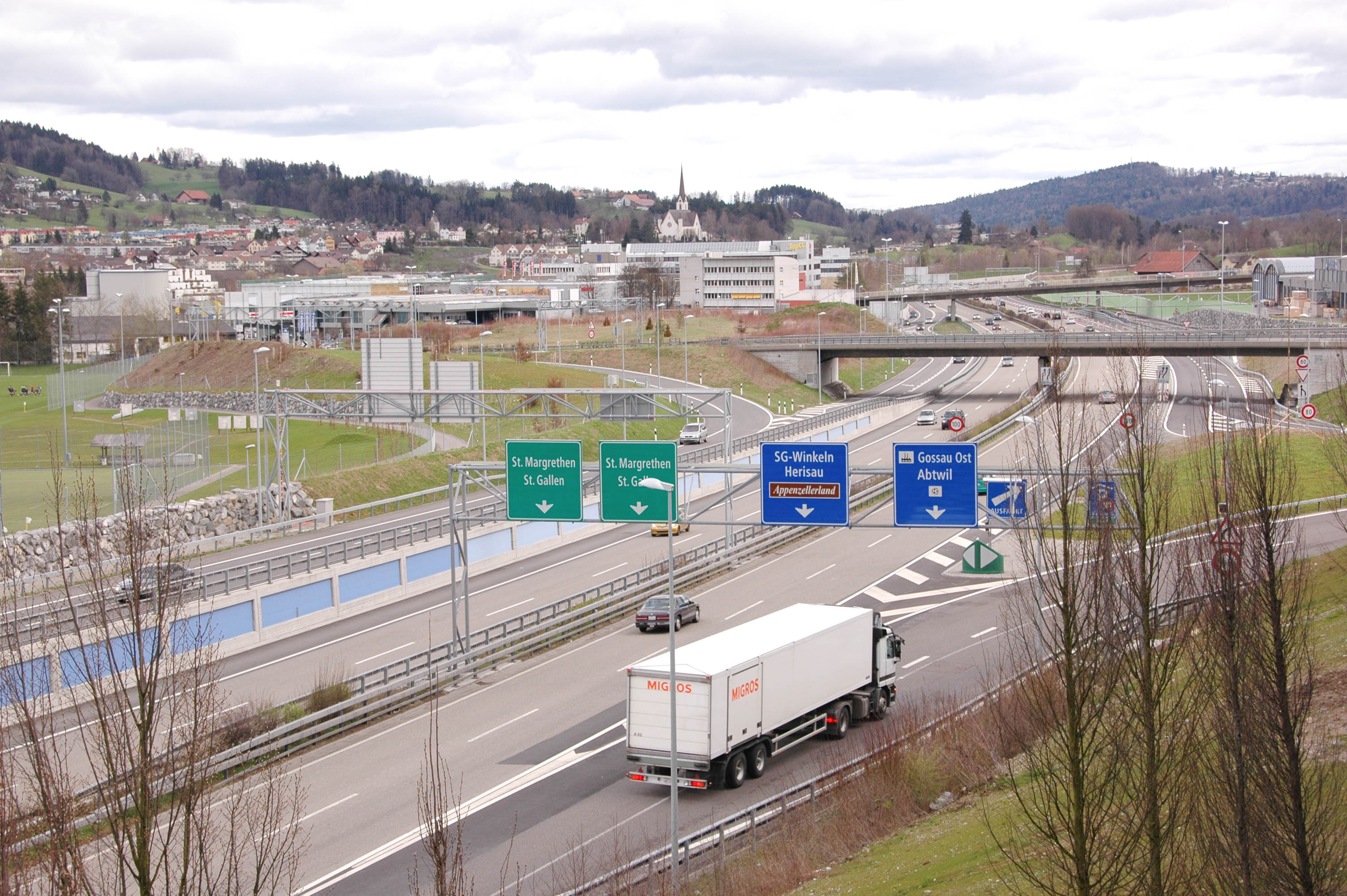 AFG-Arena während der Bauphase